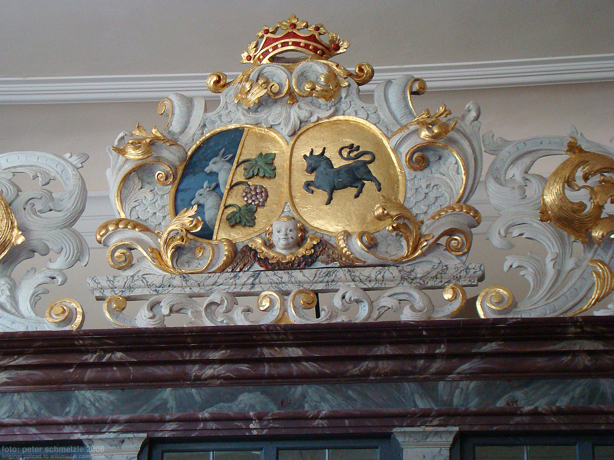 Dorfkirche in Kummerow am See, Wappen am Patronatsgestühl